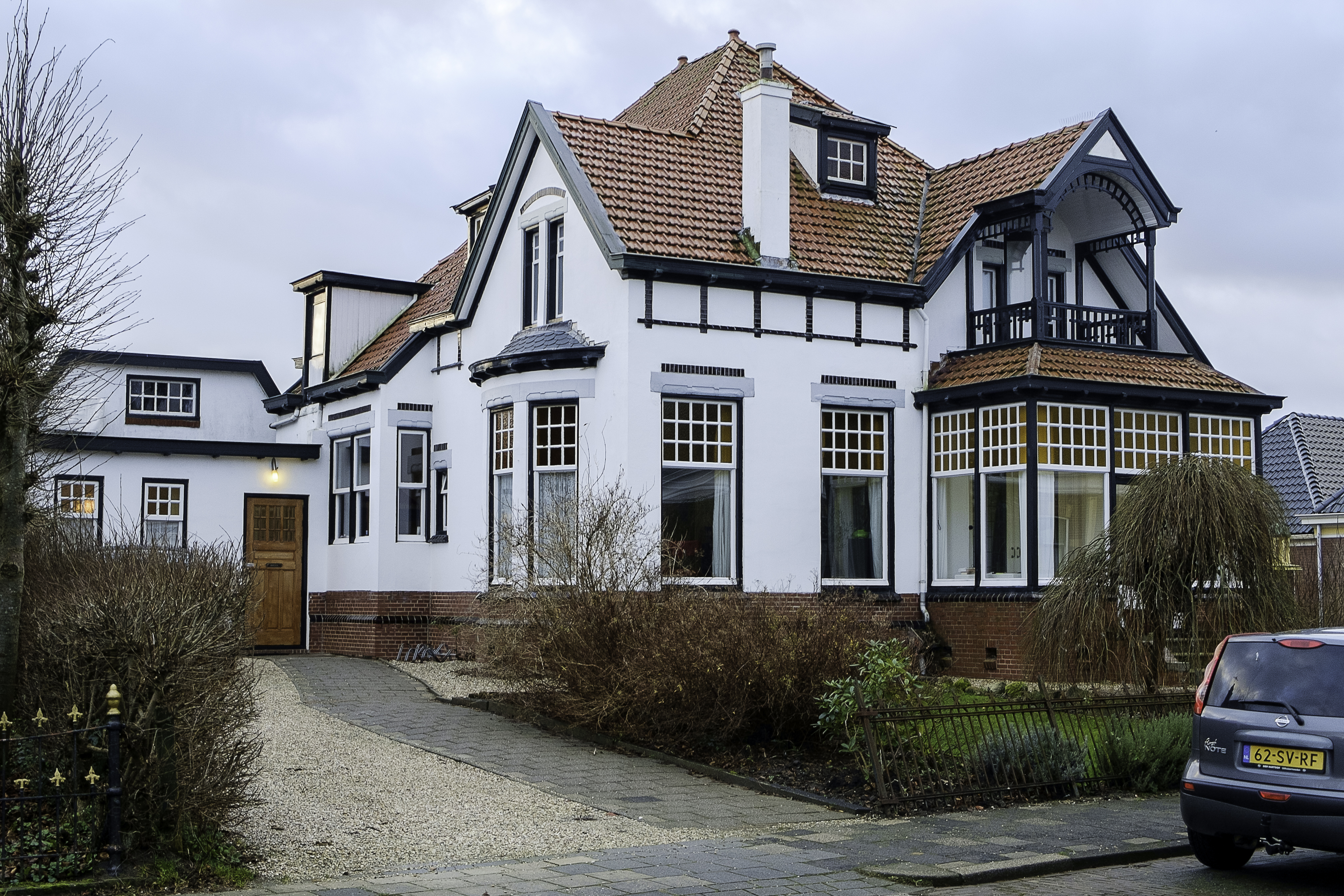 Hoogtjestraat 1 in Usquert